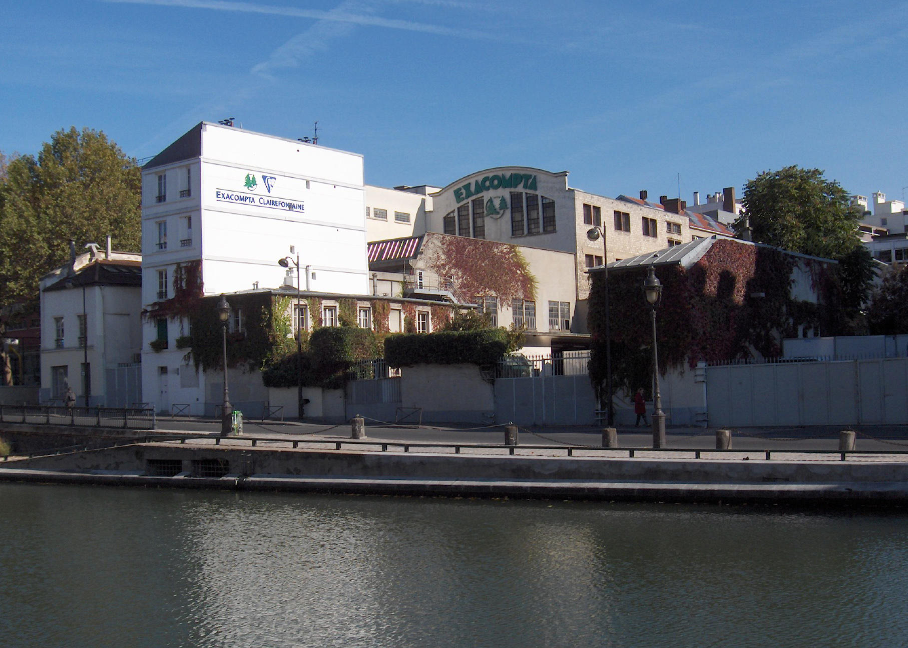 Le siège de la société Exacompta-Clairefontaine à Paris (quai de Jemmapes)